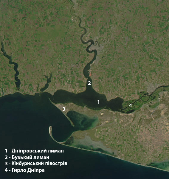 D-B liman.jpg: Дніпровсько-Бузький лиман, супутниковий знімок